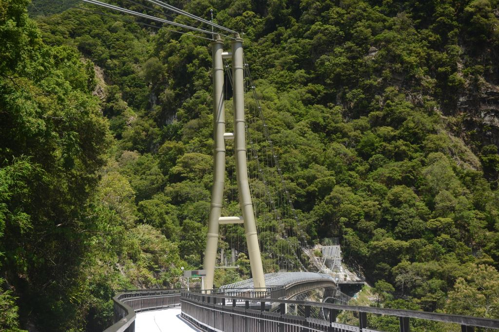 中文（台灣）: 山月吊橋的南橋柱，設計採月字型